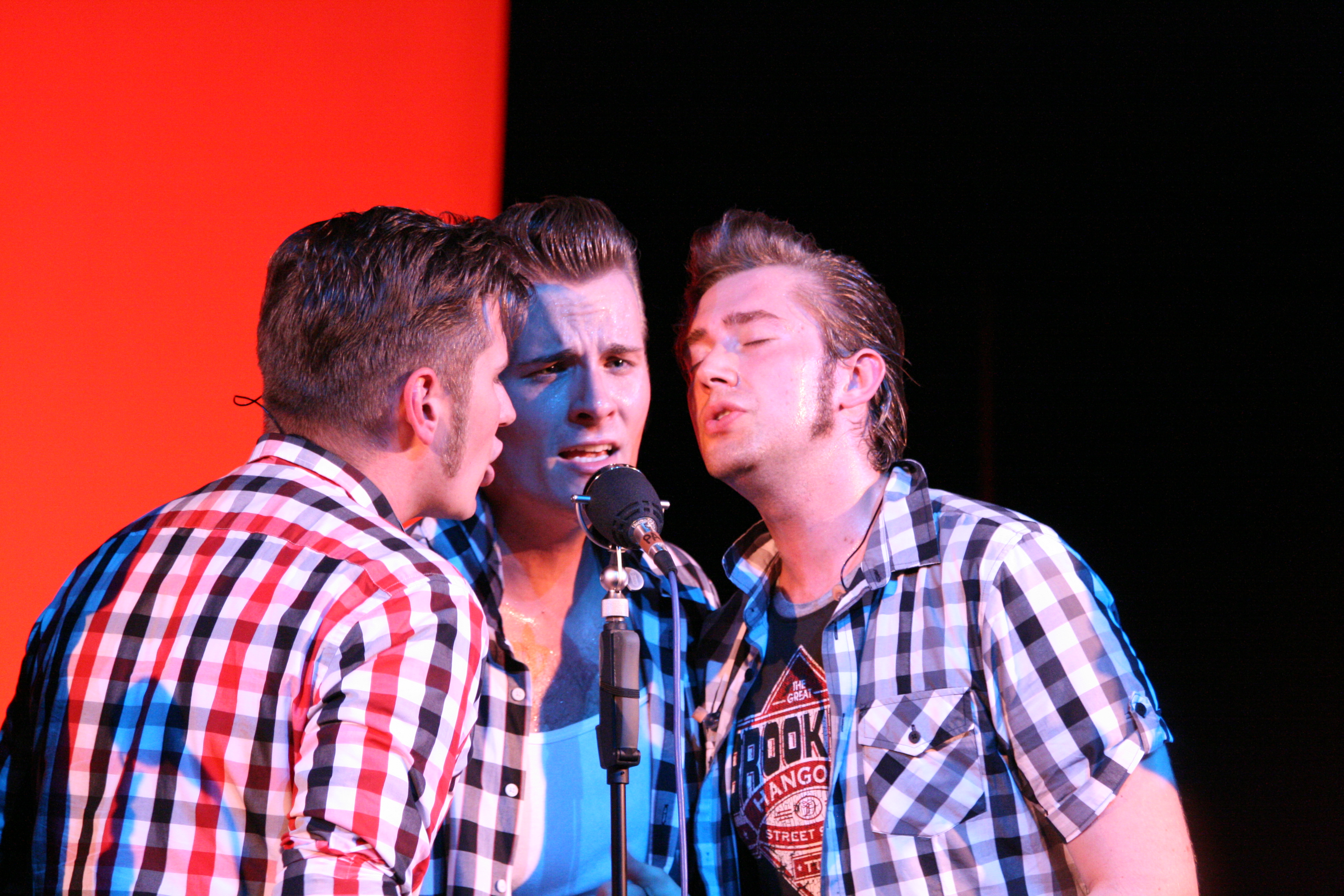 Die Baseballs im Heimathafen Neukölln am 28. Juni 2009.